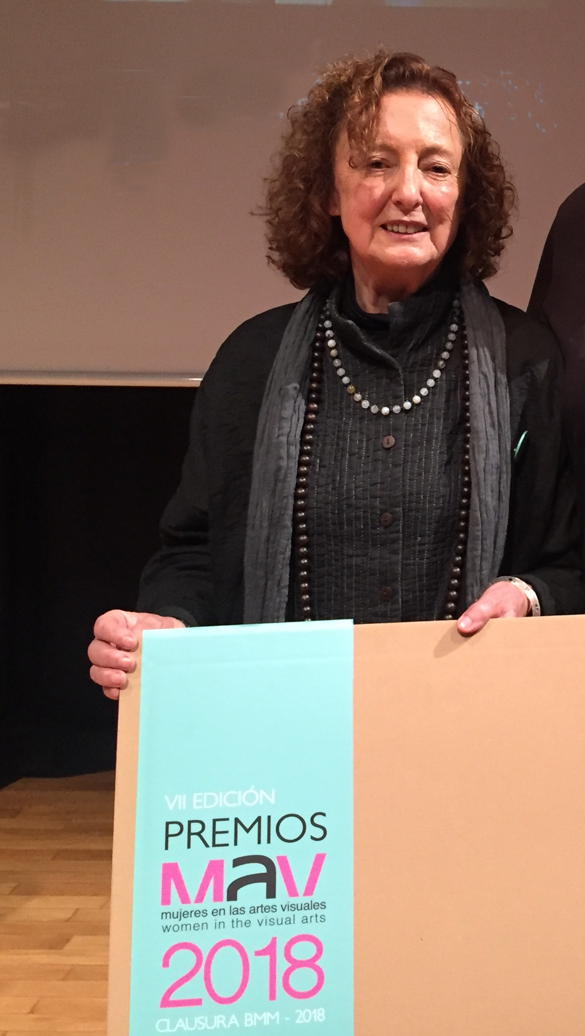 Recibiendo el Premio MAV 2018